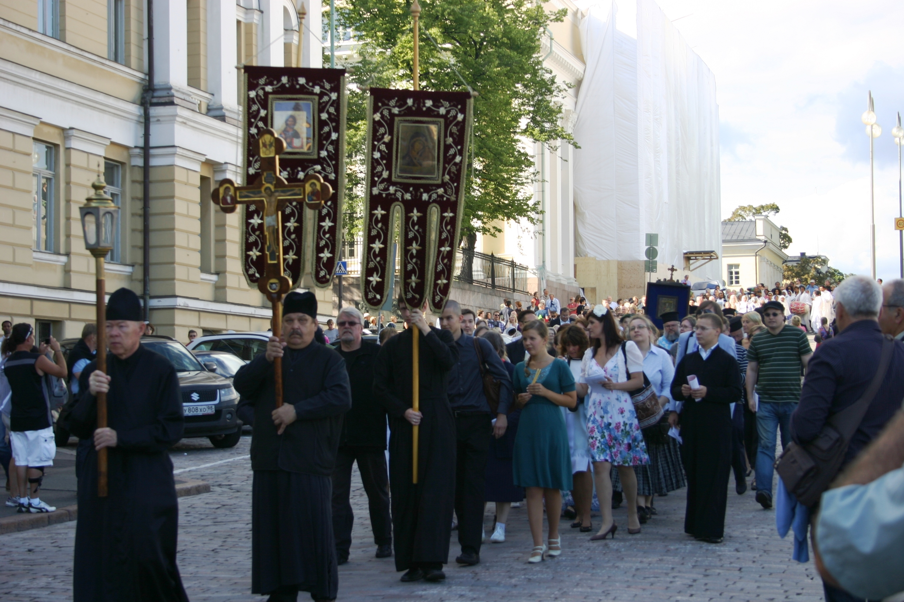 Kozelstanin ihmeitätekevän ikonin ristisaatto Pyhän Kolminaisuuden kirkosta Uspenskin katedraaliin elokuussa 2011